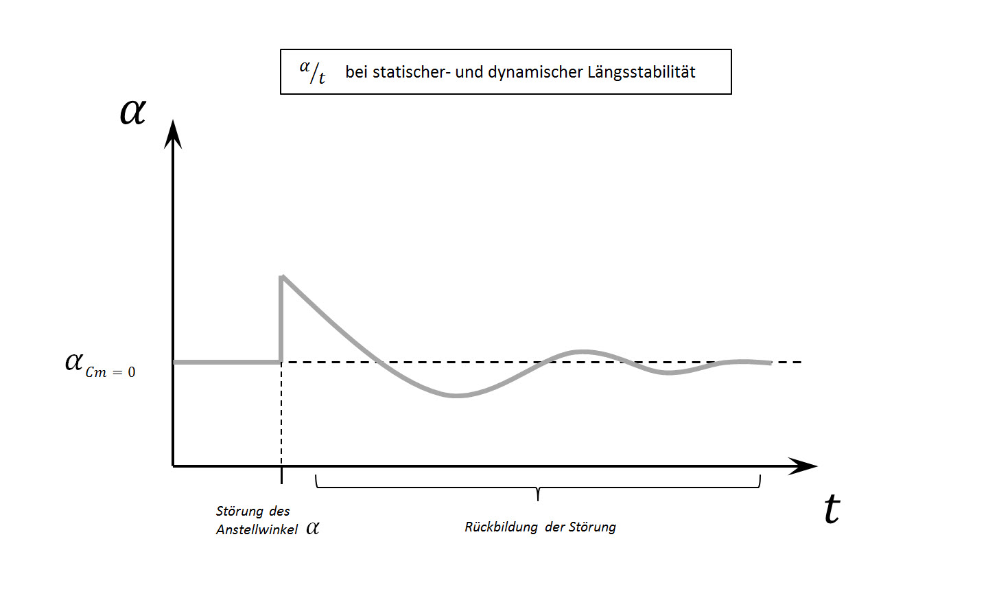 Die Abbildung zeigt den qualitativen Verlauf des Anstellwinkels Alpha über der Zeit, bei einem statisch- und dynamisch stabilen Flugzeug mit mittlerer Dämpfung.